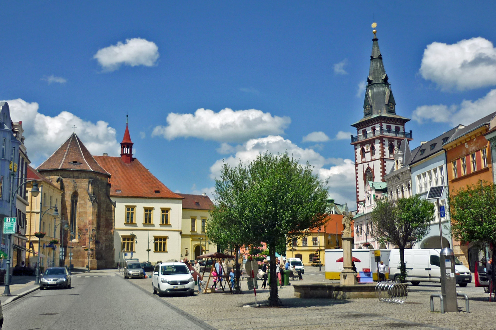 Ring mit ehem. Katharinenkirche und Stadtturm in Komotau (Chomutov)